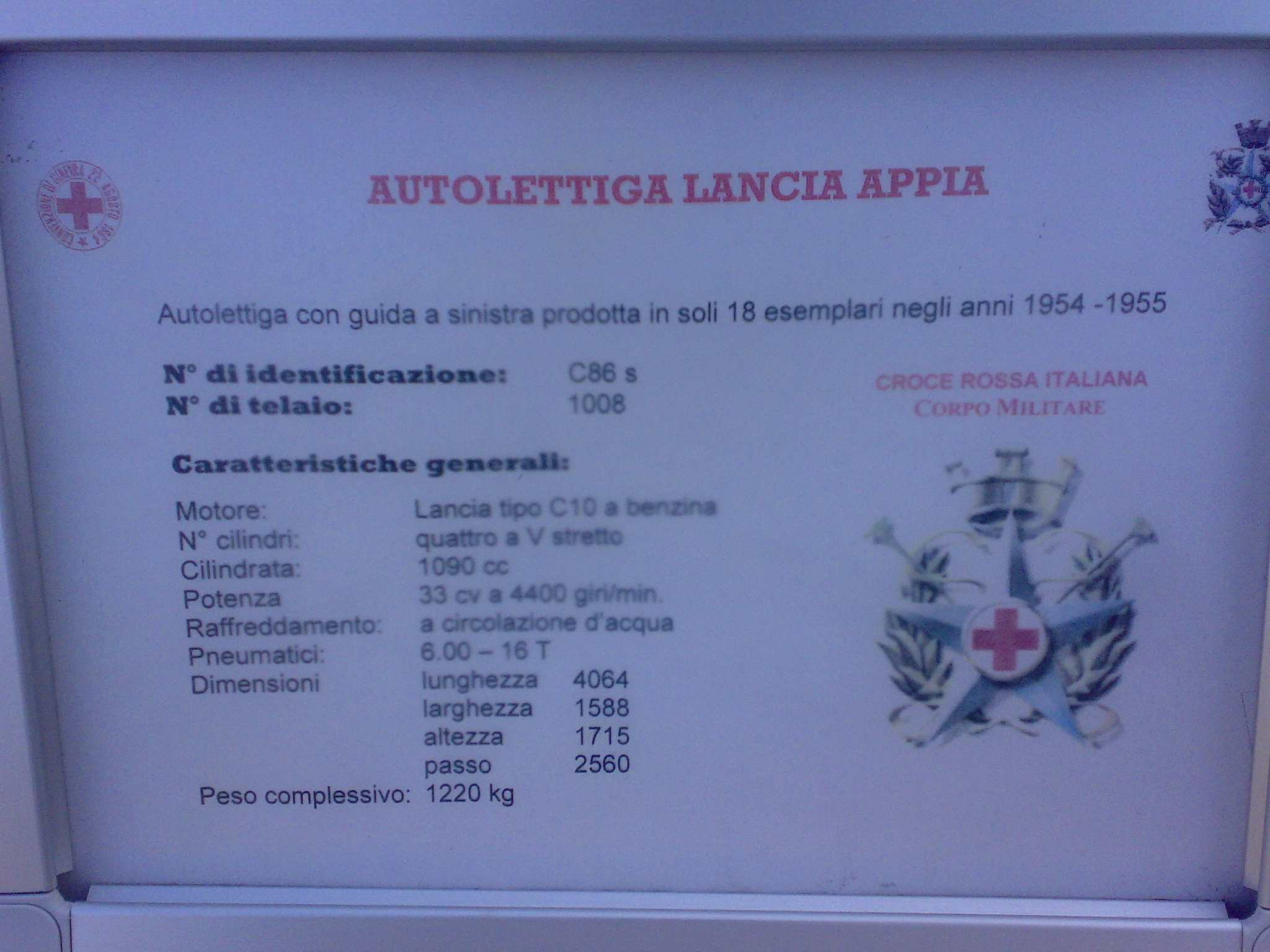 scheda con alcuni dati tecnici riguardo ad un modello di ambulanza su vettura Lancia Appia in dotazione alla Croce Rossa Italiana